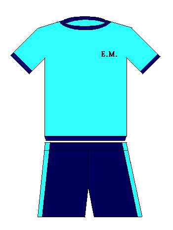 海星中學(Estrela Do Mar)之夏季運動服樣版。